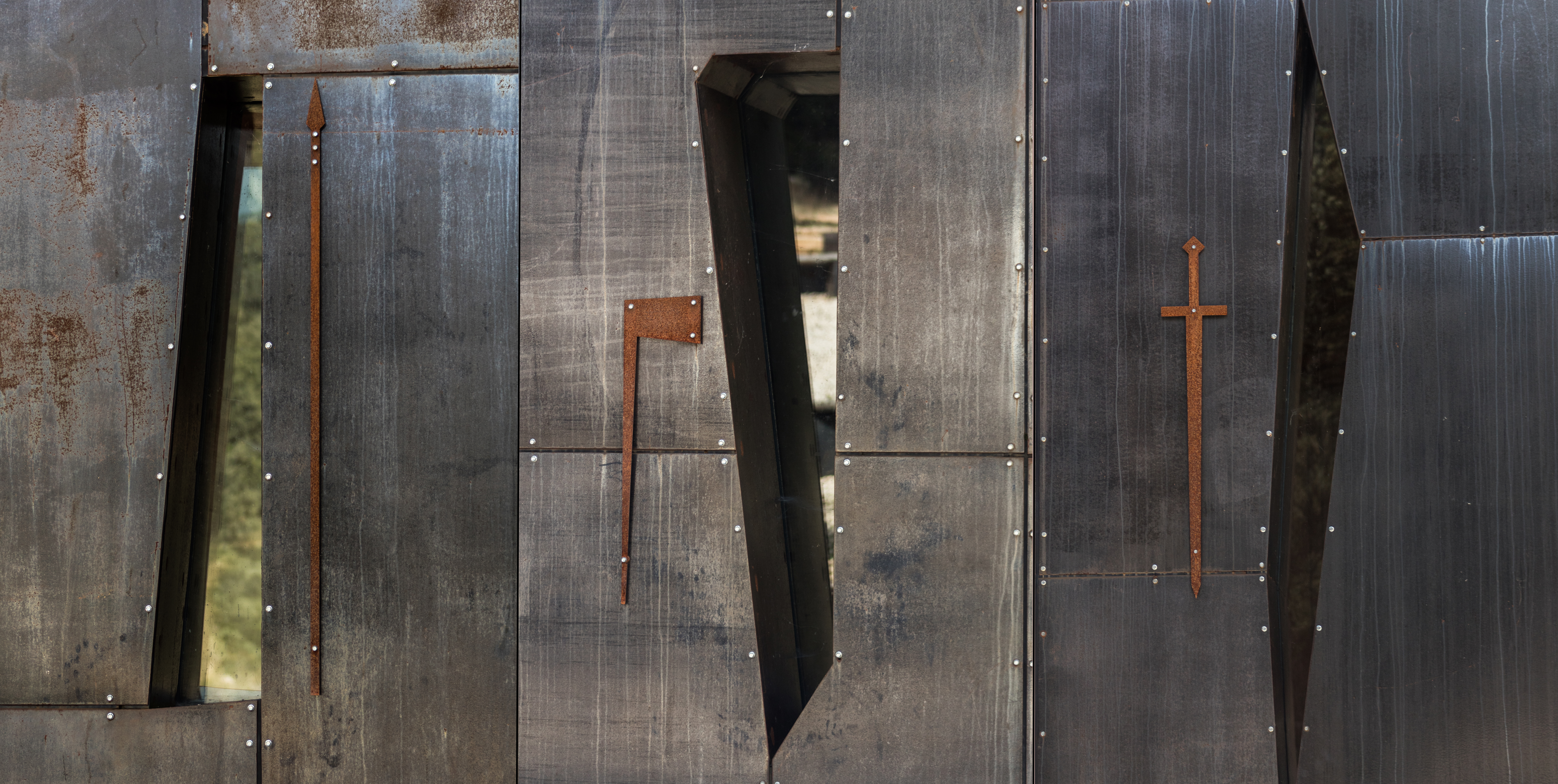 Marca lanza, hacha y espada.